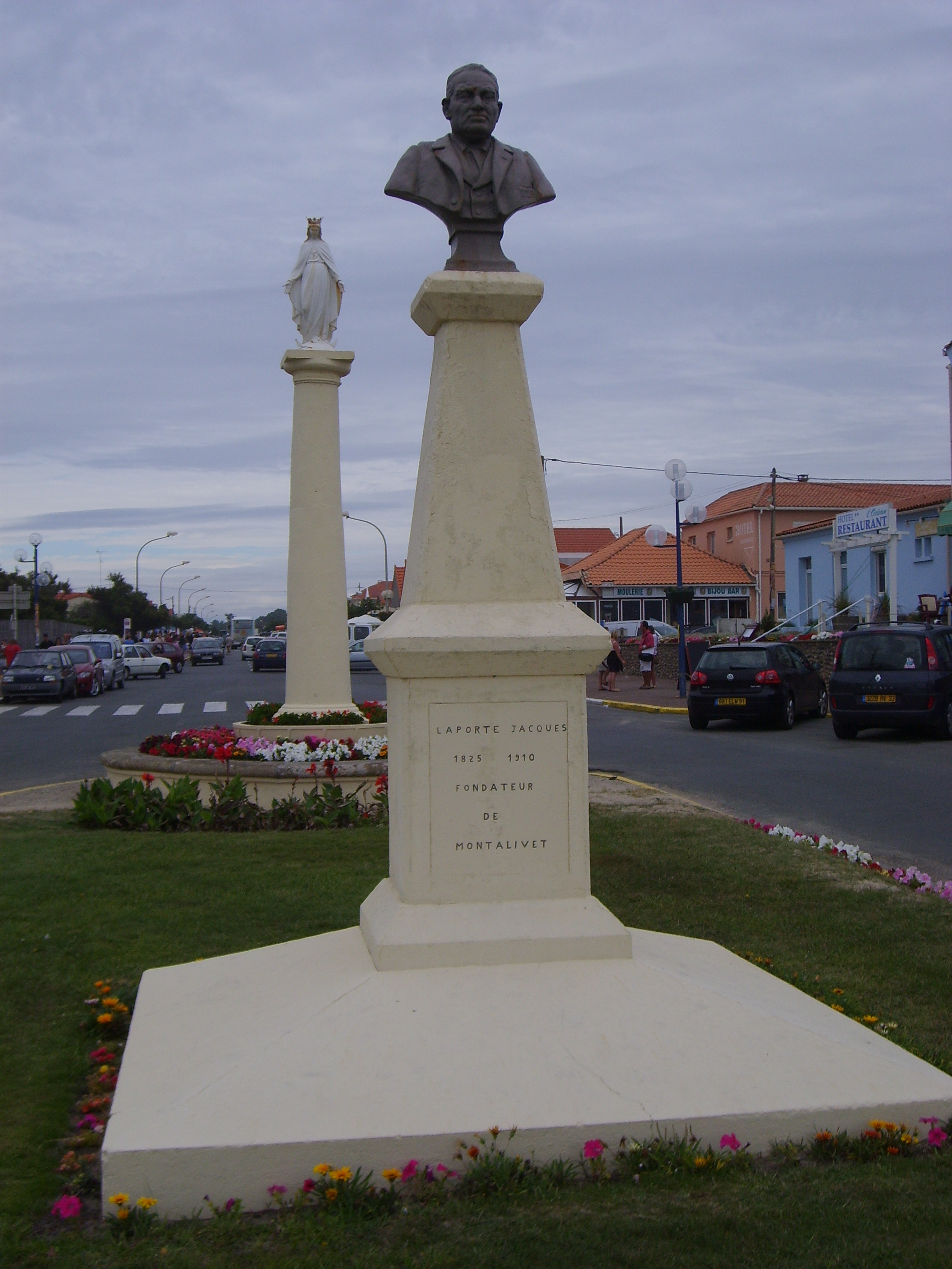 Statues à Montalivet-les-Bains (Gironde, France) : Vierge et buste de Jacques Laporte (1825-1910) fondateur de Montalivet